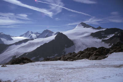 Blick auf Similaungletscher, Tirol, Via Alpina